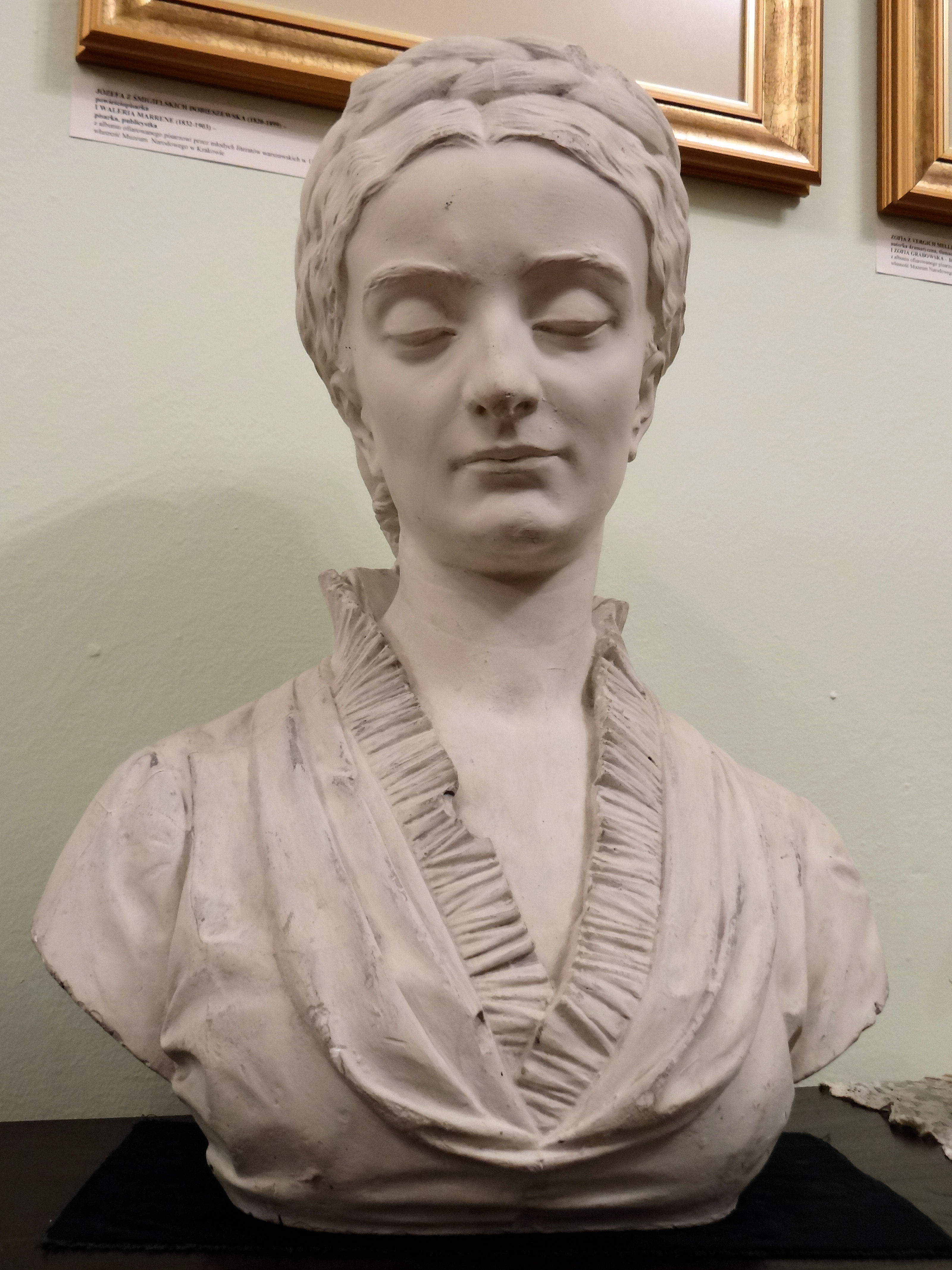 Dwór rodziny Józefa Ignacego Kraszewskiego w Romanowie - sala wystawowa - Narcyza Żmichowska (1819-1876) - popiersie wykonane przez Władysława Eljasza-Radzikowskiego w latach 80, XIX w. gips, odlew - własność Muzeum Historycznego Miasta Krakowa